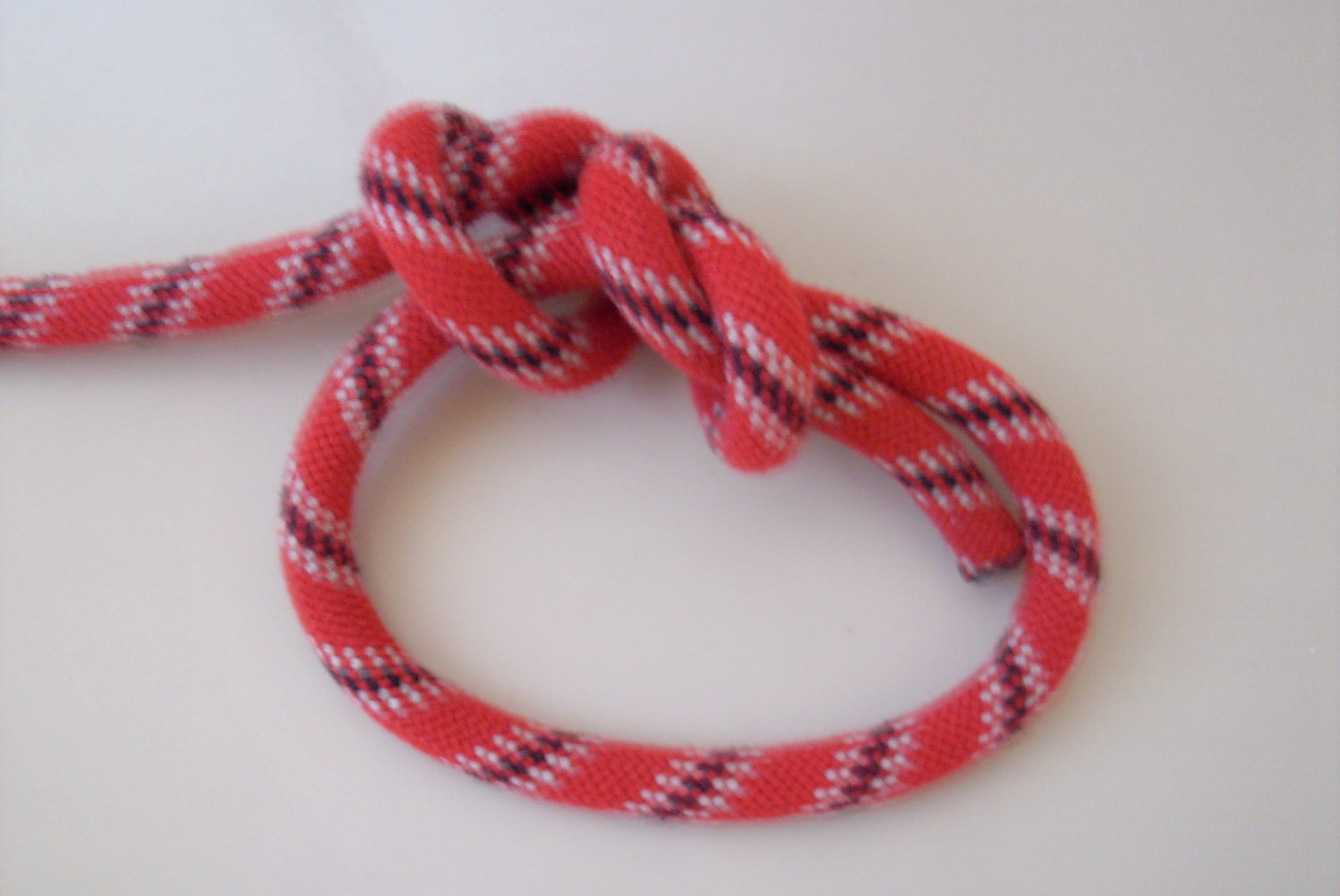 Spierenstich als Schlaufe. Wurde früher im Alpinismus in der Zweierseilschaft zum Einbinden ins Bergseil verwendet.